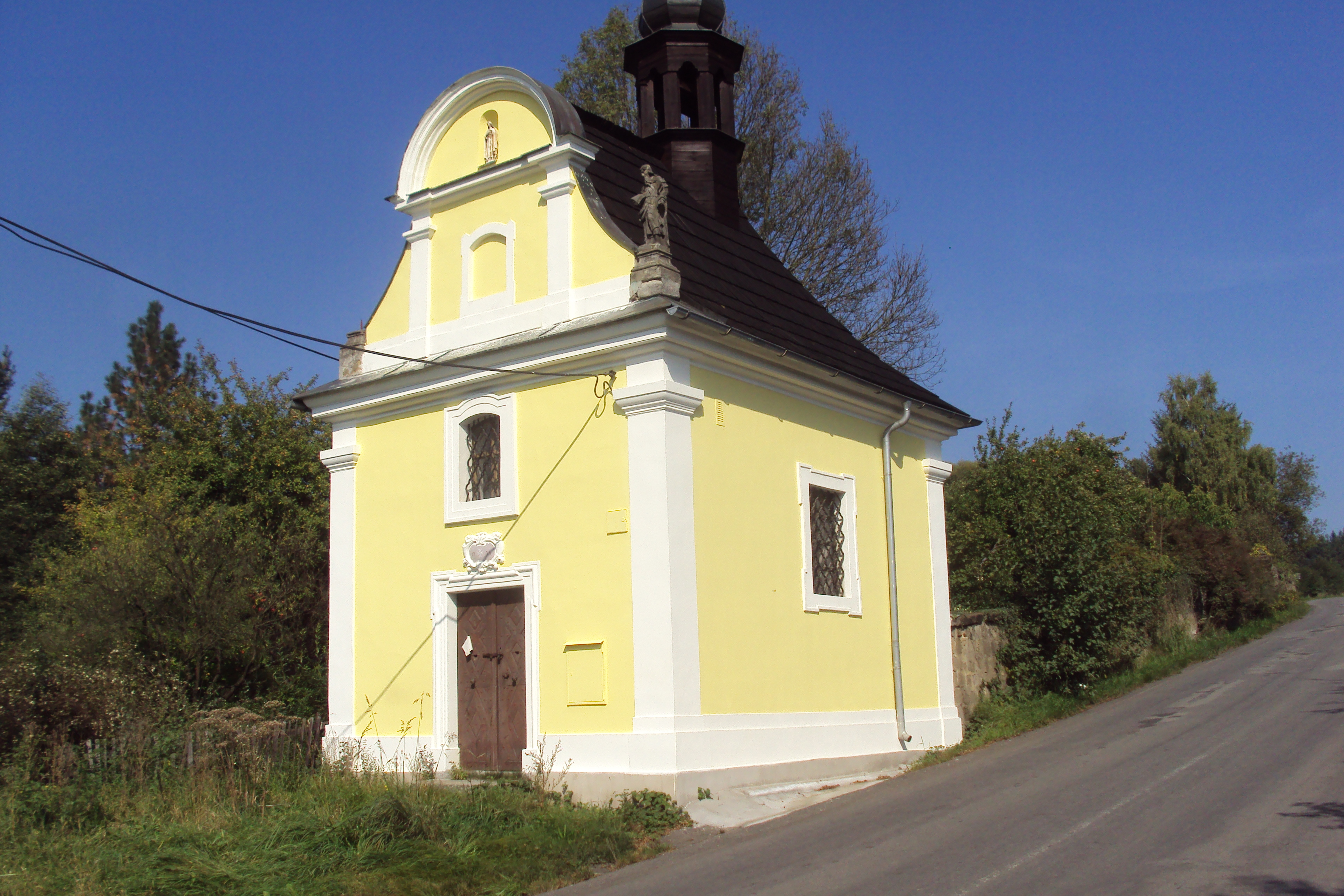 Kaple sv.Maří Magdaleny v horní části Dolního Pihelu